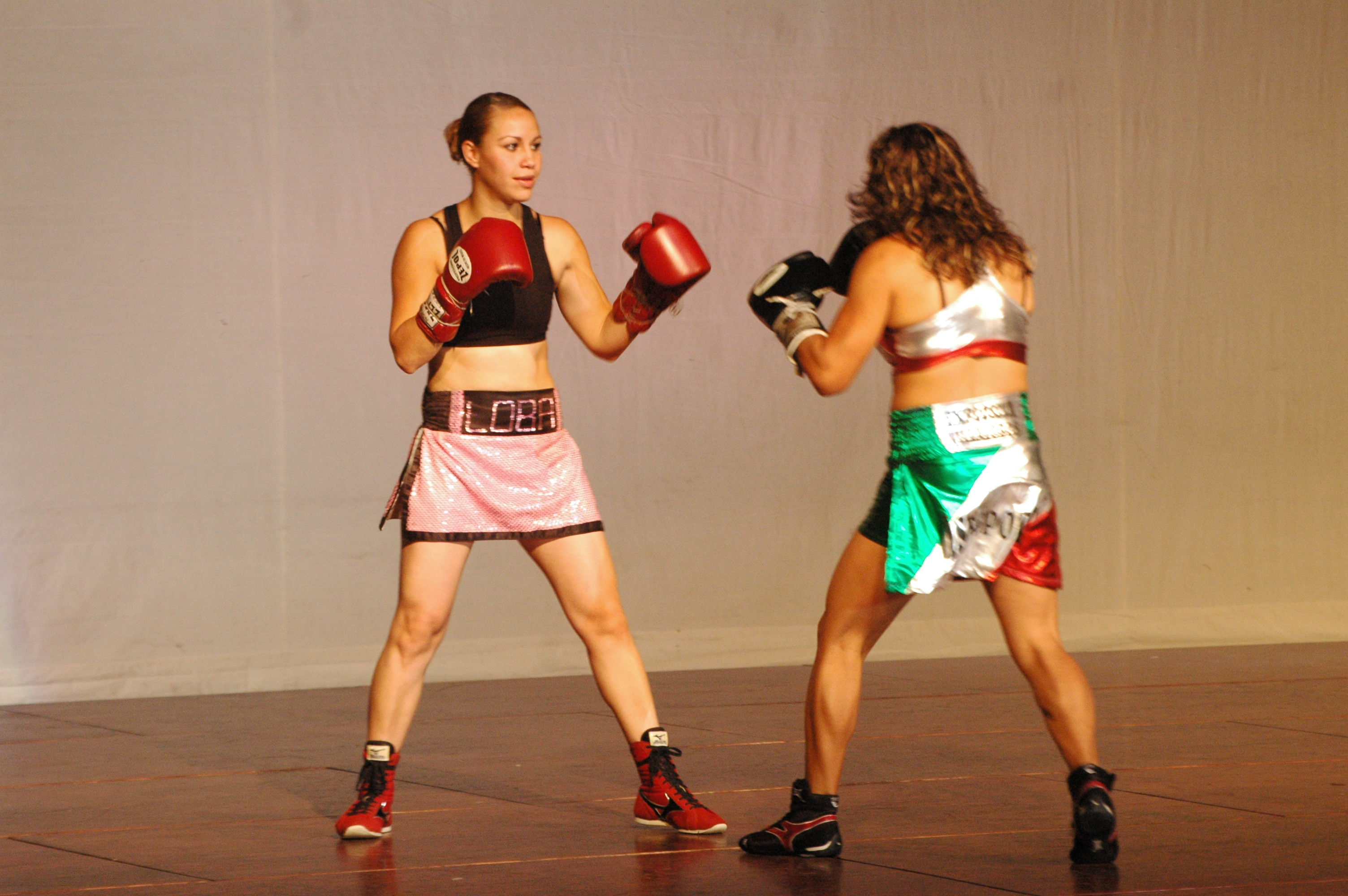 Boxeadoras Mary y Loba en el evento Semana de la Cultura en ITESM Campus Ciudad de México